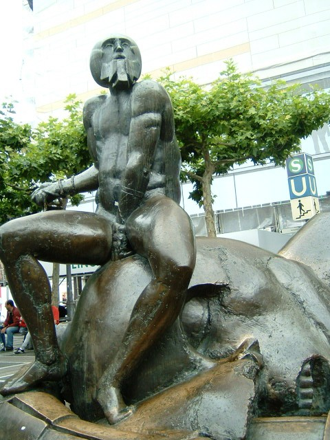 Skulptur des Künstlers Richard Heß; Standort: Zeil in Frankfurt am Main; David sitzt auf Goliaths Kopf